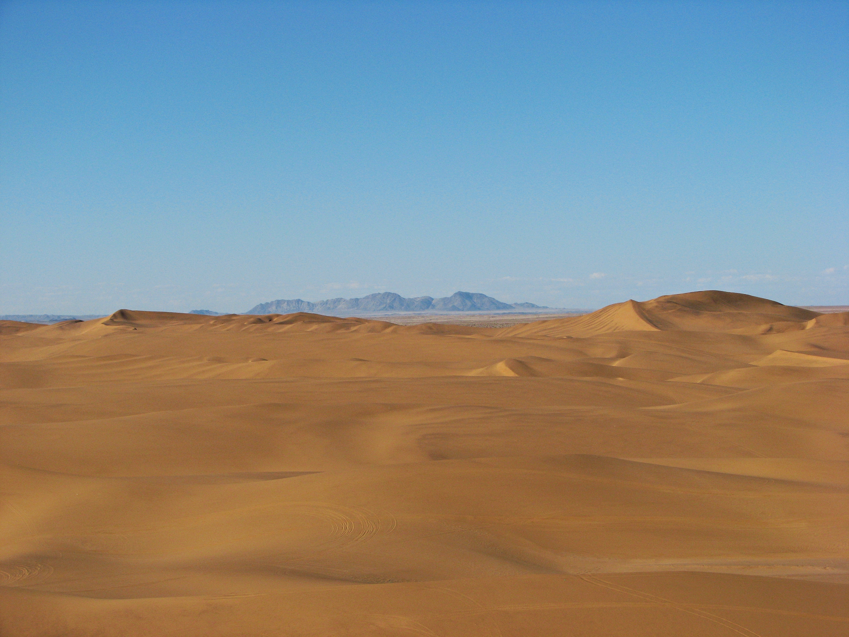 Dorob-Nationalpark mit Erongo Gebirge im Hintergrund